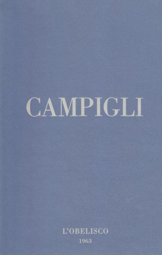 Catalogo della mostra del pittore italiano Massimo Campigli tenutasi alla Galleria dell'Obelisco di Roma nel 1963